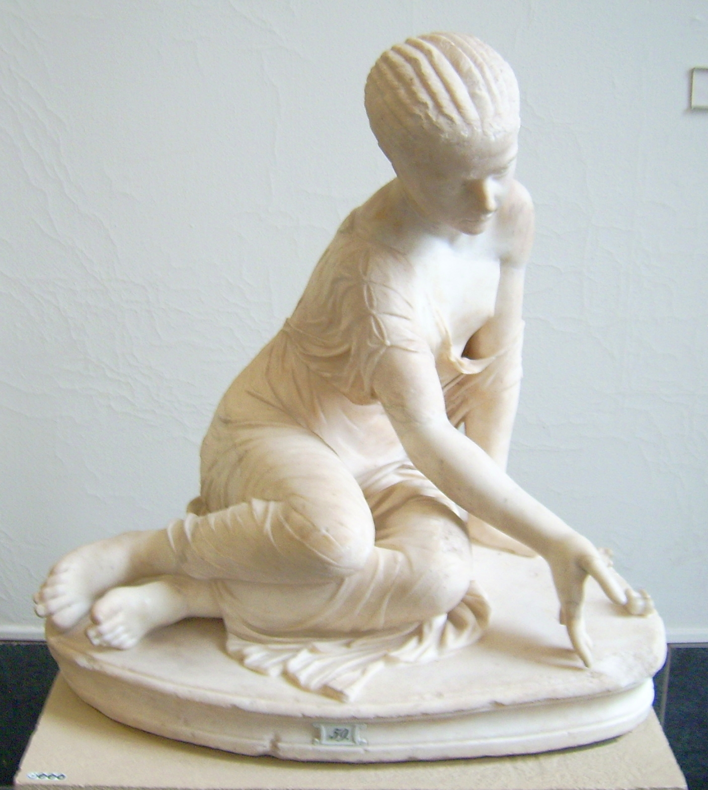 Knöchelspielerin in der Antikensammlung Berlin/Pergamonmuseum (Sk 494/R 75), 1730 auf dem Caelius in Rom gefunden, Ende des 2. Jahrhunderts, römische Kopie nach hellenistischen Vorbild, Marmor, Höhe 70 cm